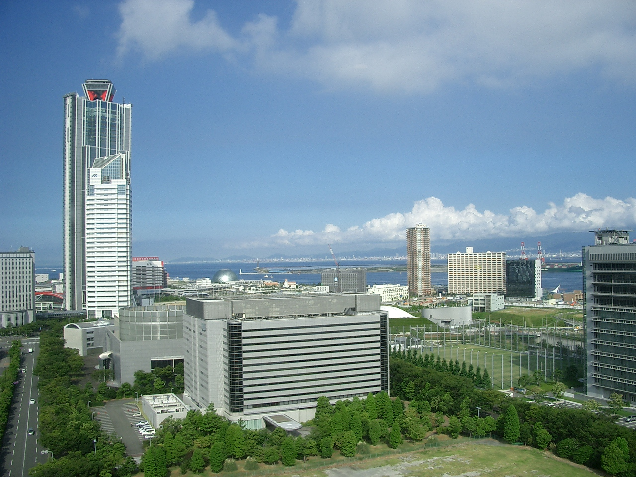 This photo presents Cosmosqueare area in Sakishima, Suminoe, Osaka. ja: 咲洲コスモスクエア地区。国際交流センターより撮影。